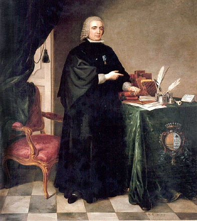 Retrato del politico e ilustrado español Pedro Rodríguez de Campomanes (1723-1802), que fue el primer conde de Campomanes.